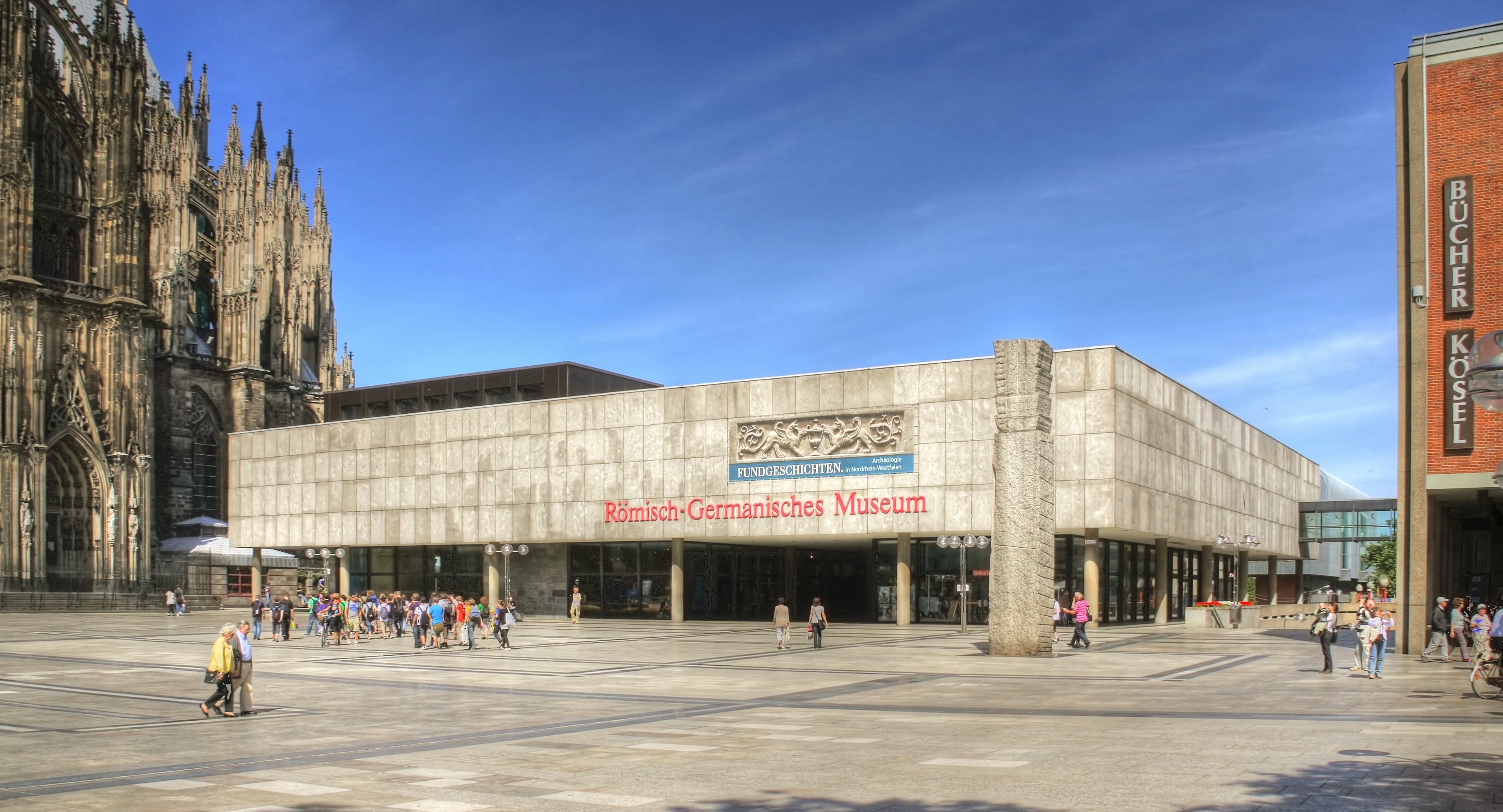 Römisch Germanisches Museum Köln - Domplatte/Roncalliplatz. Architekt: Heinz Röcke. Baujahr: 1967-74